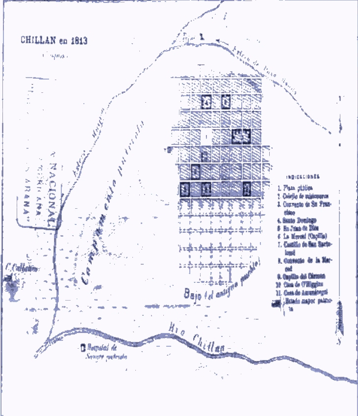 Croquis de Chillán (Chillán Viejo), levantado para sostener el sitio contra esta ciudad en julio y agosto de 1813.